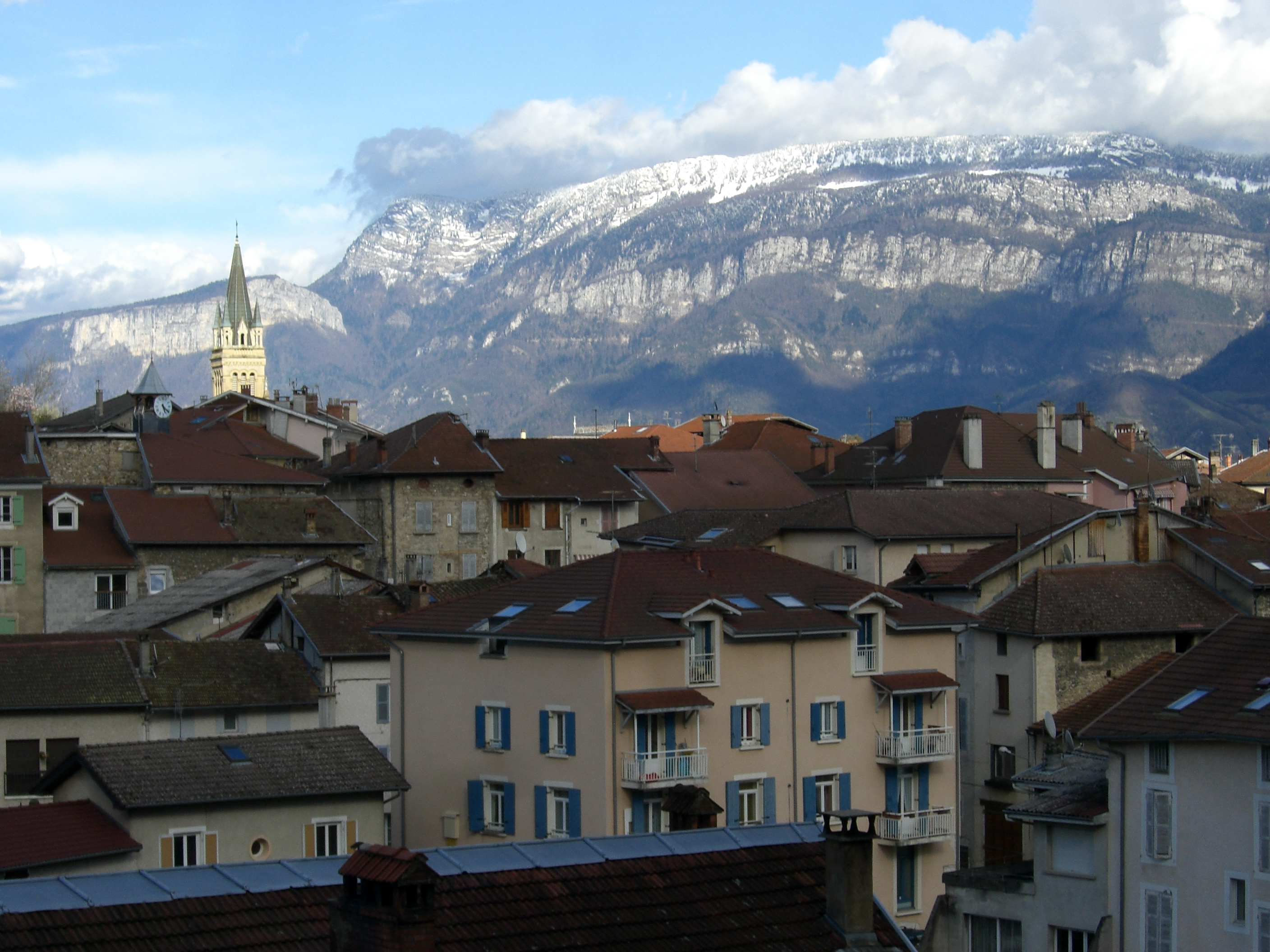 Vue de Vinay